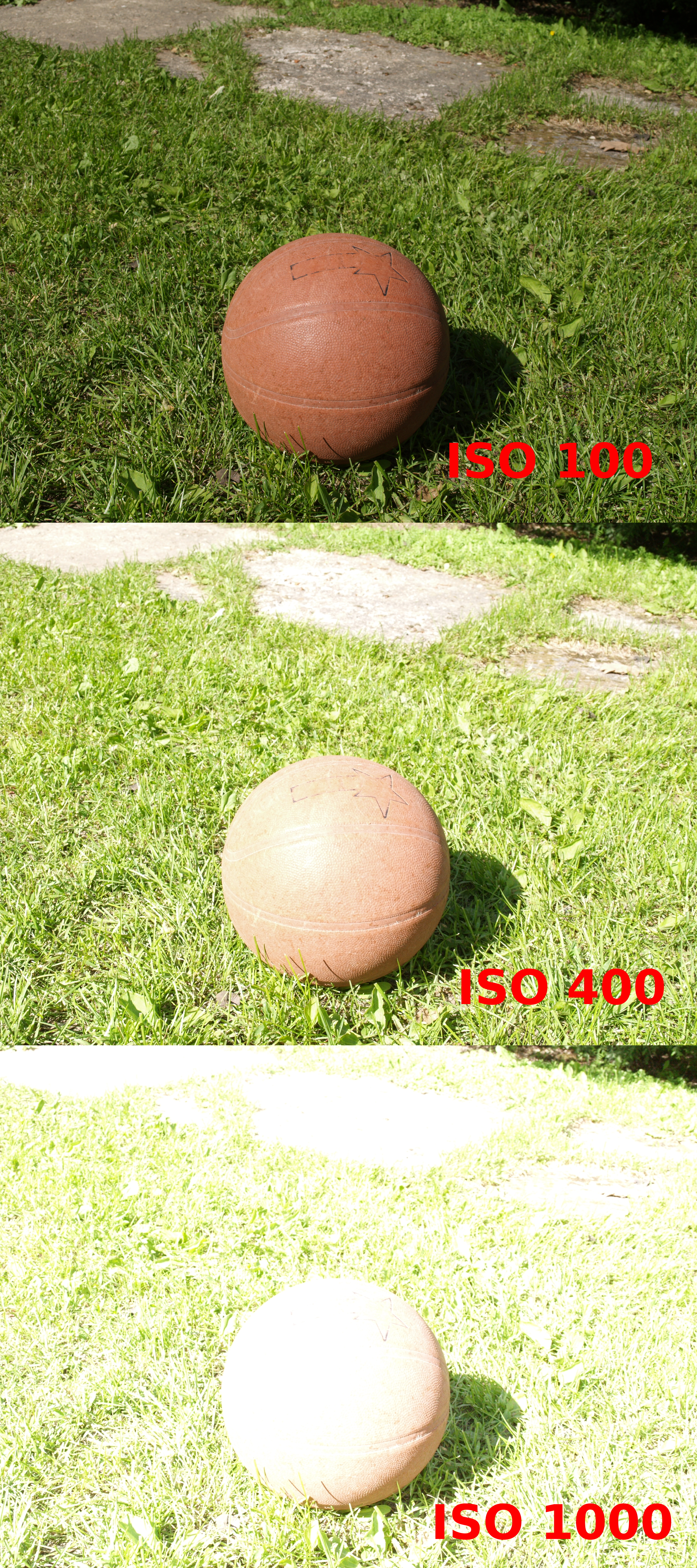 ISO-herkkyyksien 100, 400 ja 1000 vertailu.